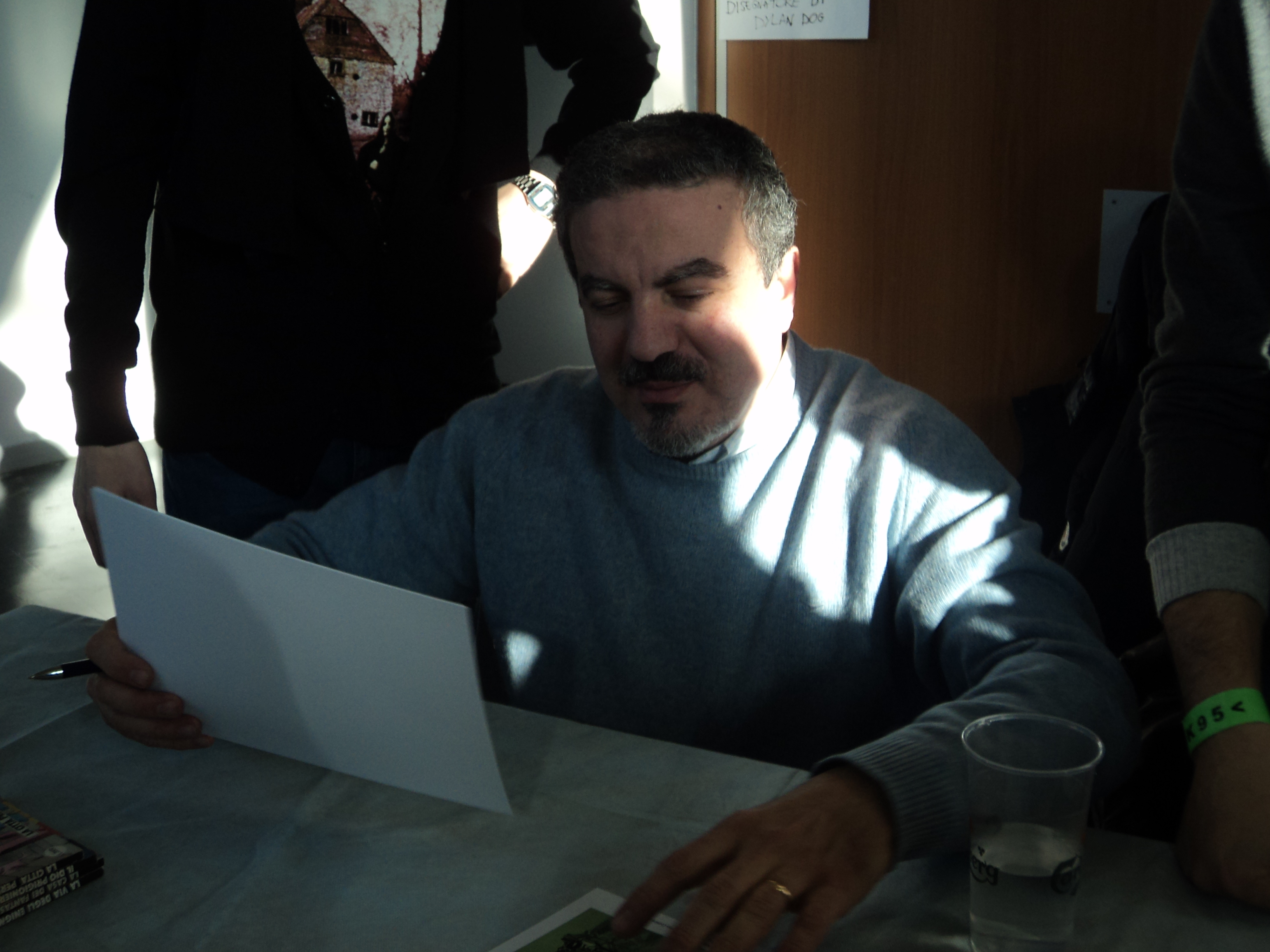 Daniele Bigliardo@Roma Comics & Games 2013